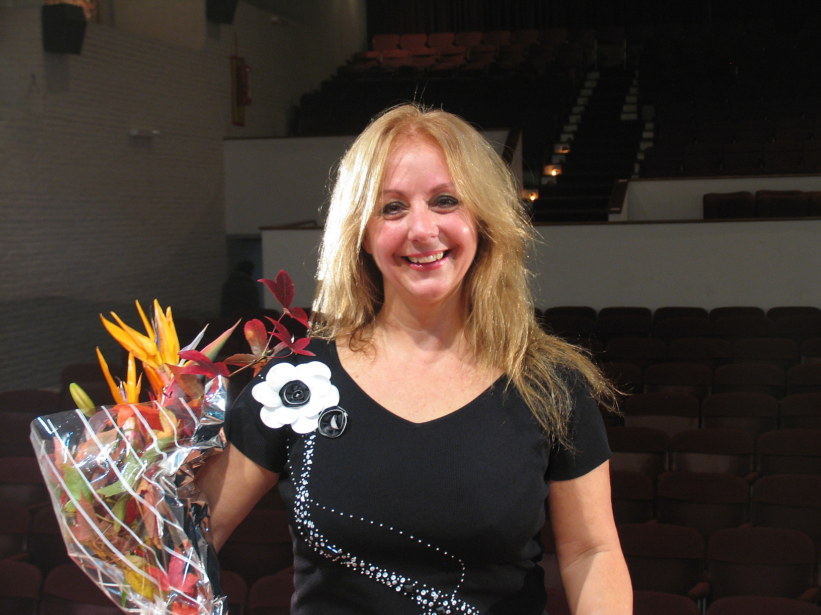 Cristina García Banegas en auditorio de Punta del Este